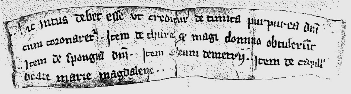 Perkamenten schedula, cedula of reliekenbriefje uit ca. 1300, afkomstig uit de Onze-Lieve-Vrouwekerk in Maastricht, thans in de collectie van het RHCL Maastricht, GAM, parochie OLV, 265 B. De schedula is mogelijk afkomstig uit het Maria-enkolpion in de schatkamer van de Onze-Lieve-Vrouwebasiliek.